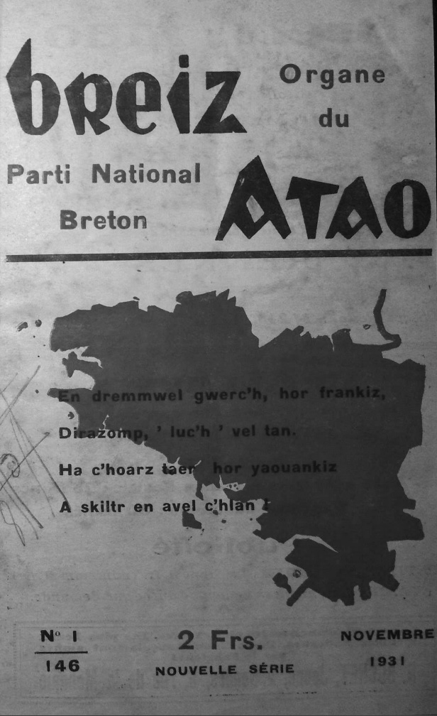 couverture du N°1/146 de la revue Breiz Atao, novembre 1931